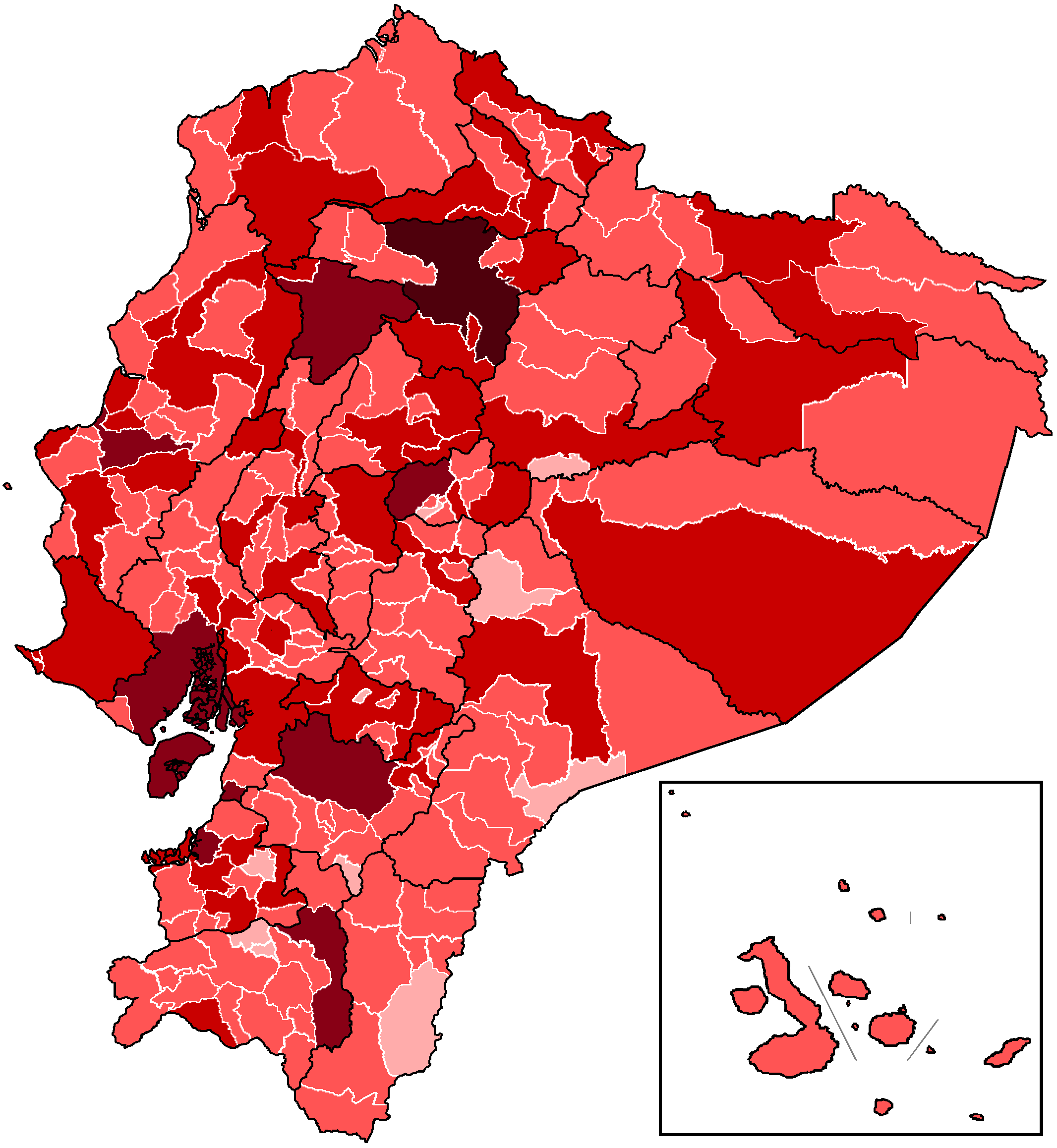 Incidencia del COVID-19 en Ecuador por cantones English (en): Map of the 2019-nCoV outbreak in Ecuador as of 7 May. 1-9 Confirmed cases reported 10-99 Confirmed cases reported 100-999 Confirmed cases reported 1,000-9,999 Confirmed cases reported 10,000-99,999 Confirmed cases reported